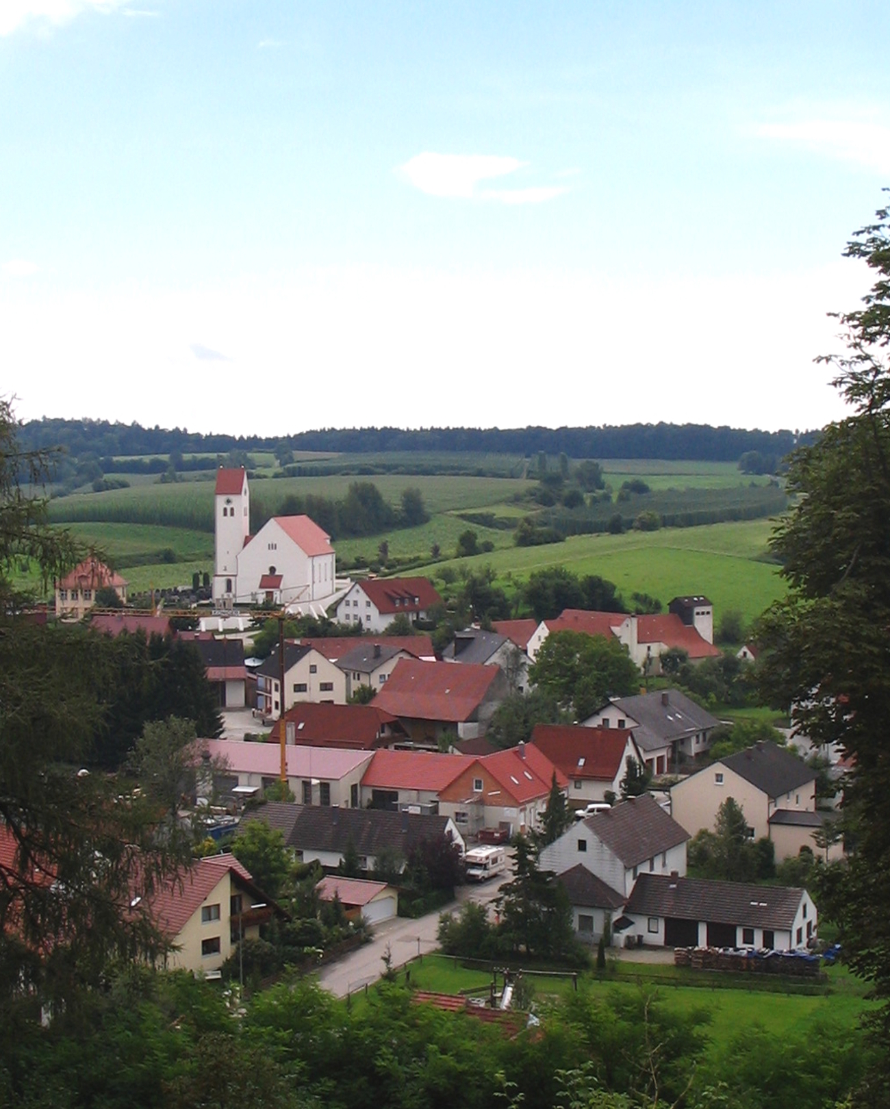 Ortsansicht der Gemeinde Rottenegg (Geisenfeld)